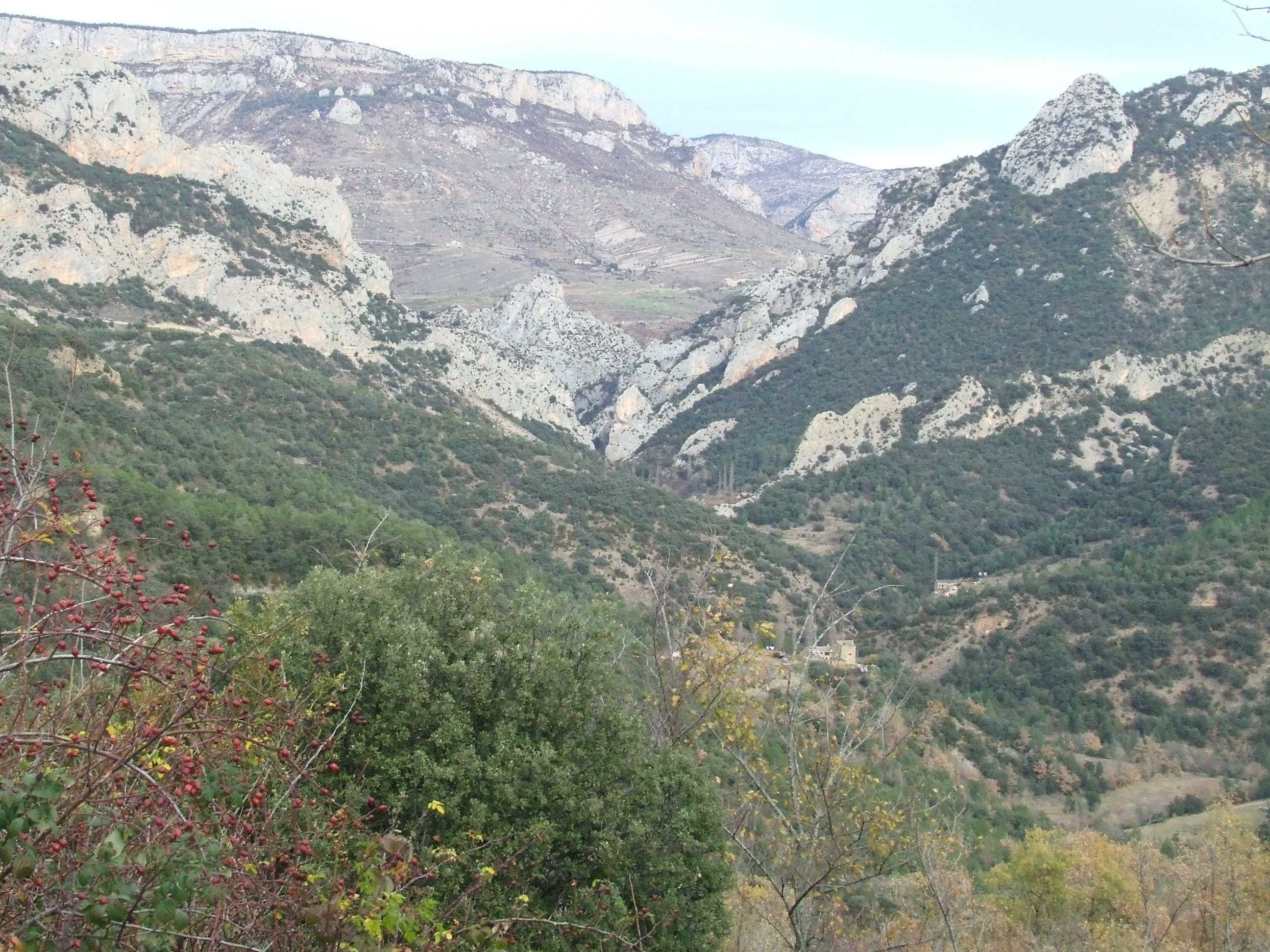 La vall alta del riu de Pujals (Bóixols, Abella de la Conca, Pallars Jussà)